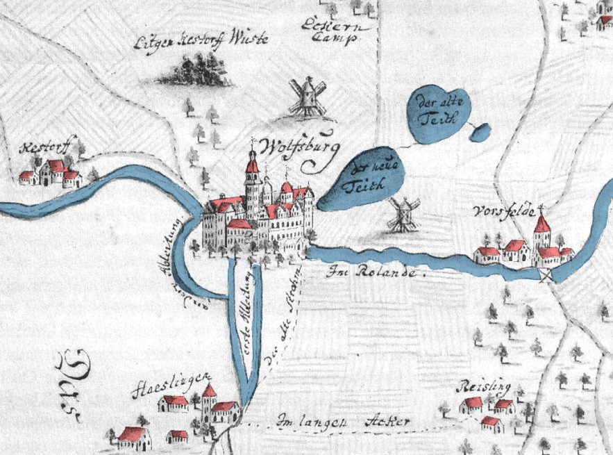 Landkarte vom Umland von Schloss Wolfsburg